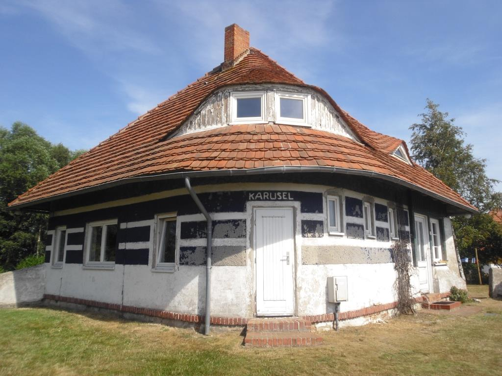 Asta Nielsens Haus "Karusel" auf Hiddensee